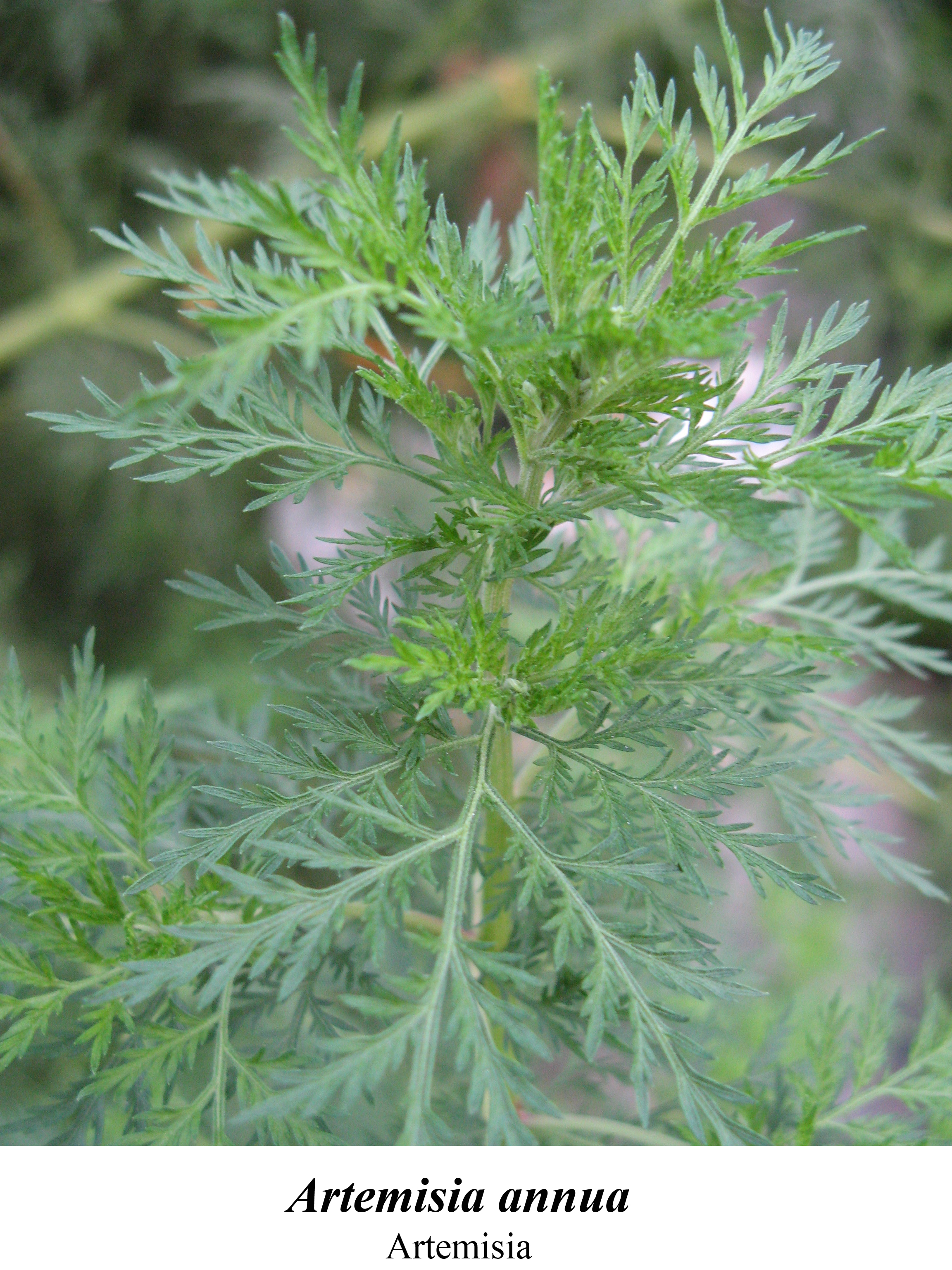 planta medicinal